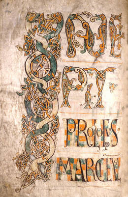 Zierblatt des Karolingischen Evangeliars, Domschatzkammer Essen Hs.1